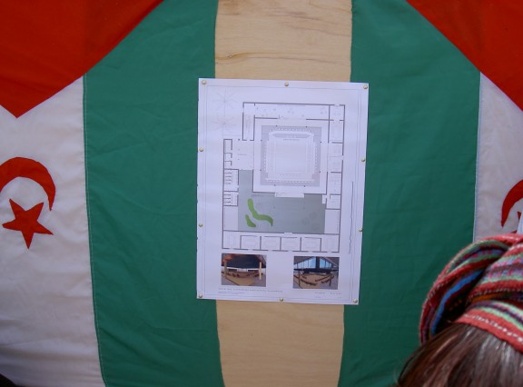 Foto del plano del futuro parlamento de la R.A.S.D. al iniciarse su construcción de forma oficial.